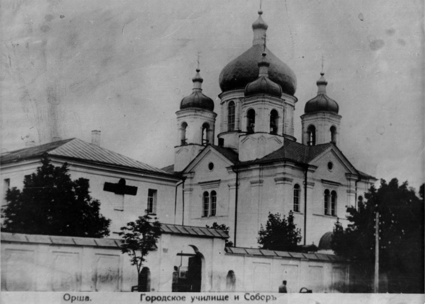 Беларуская (тарашкевіца): Ворша (Vorša), вуліца Магілёўская (vulica Mahiloŭskaja). Касьцёл Найсьвяцейшай Тройцы і кляштар трынітарыяў па маскоўскай перабудове